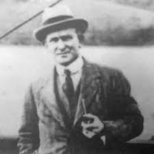 David Blair